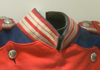 Museum Humpisquartier, Ravensburg Ausgehuniform bzw. Paradeuniform des Württembergischen Ulanen-Regiments 19, nach 1900; Besitzer: Alfons Jehle (Ravensburg), 5. Eskadron des Ulanen-Regiments 19 in Ulm; Schenkung S. Jehle, Karlsruhe Humpis-Quartier Native nameMuseum Humpis-QuartierLocationRavensburg, GermanyCoordinates47° 46′ 49.8″ N, 9° 36′ 57.24″ E Established2009Web page control : Q1637298 VIAF: 128828875 LCCN: nb2007020847 GND: 4565586-8 WorldCat institution QS:P195,Q1637298